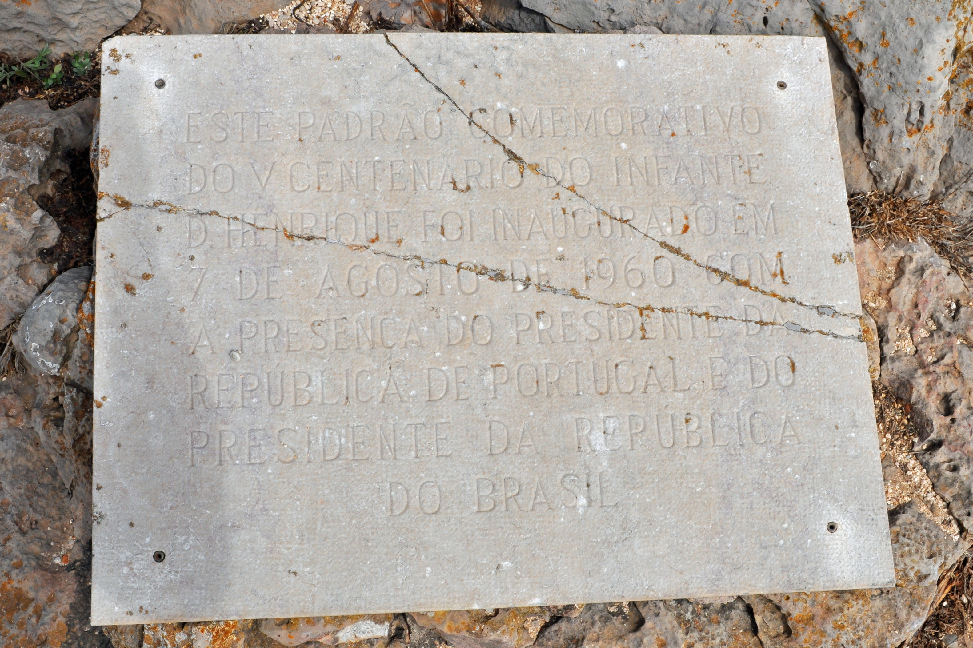 Fortaleza de Sagres (2012-09-25), by Klugschnacker in Wikipedia (58)